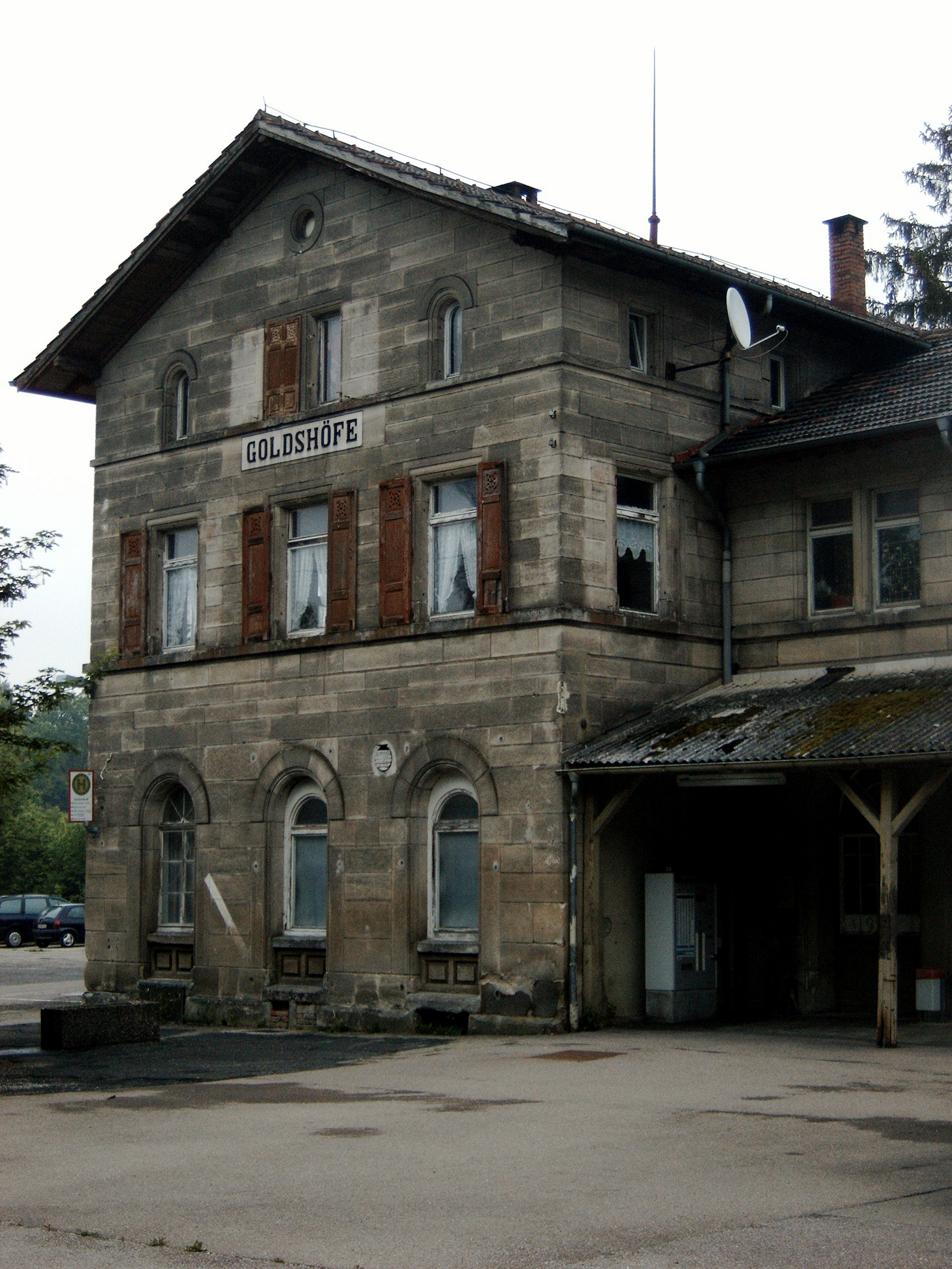 Bahnhof Goldshöfe der Riesbahn und Oberen Jagstbahn, Ansicht von Nordwest, den Gleisen der Jagstbahn (2006)